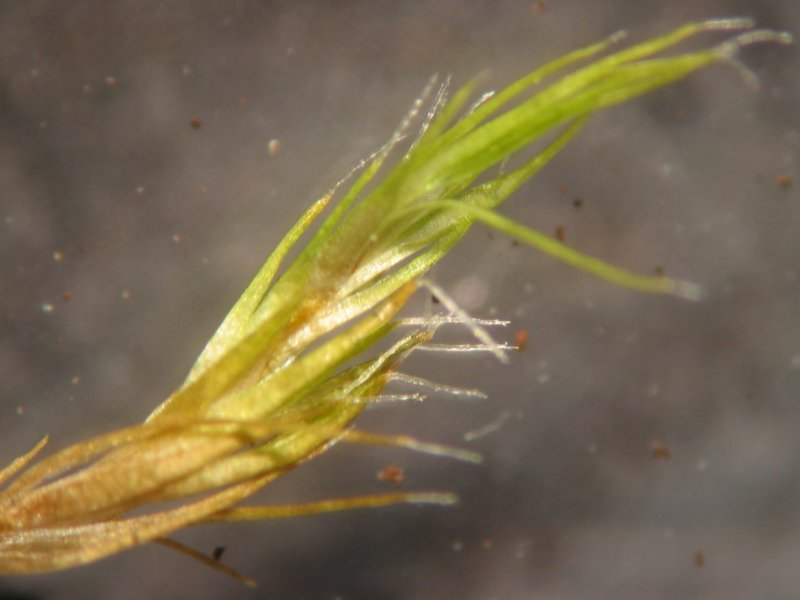 Glashaar von Campylopus introflexus, Hiddensee